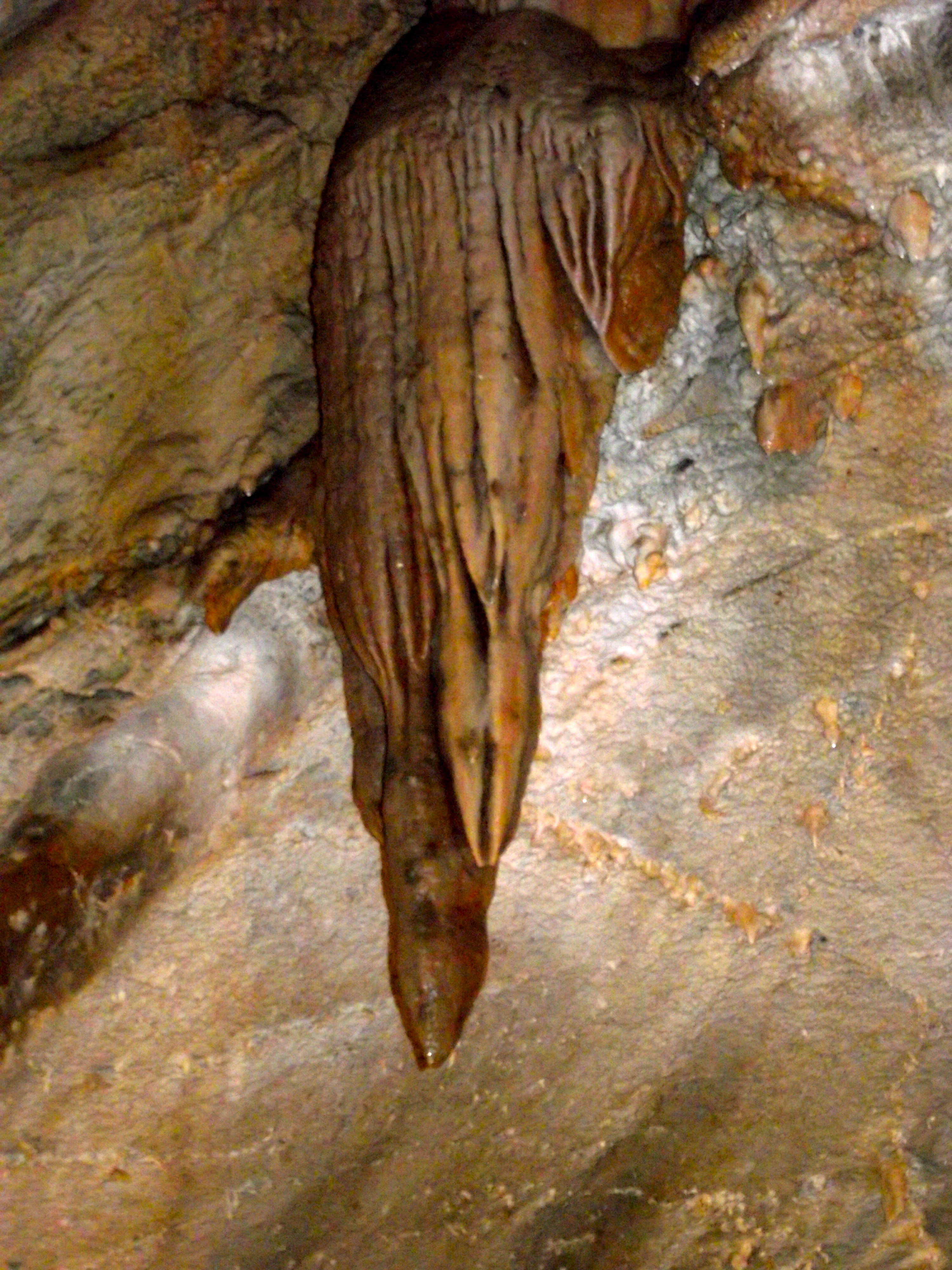 Ryongmun Caves